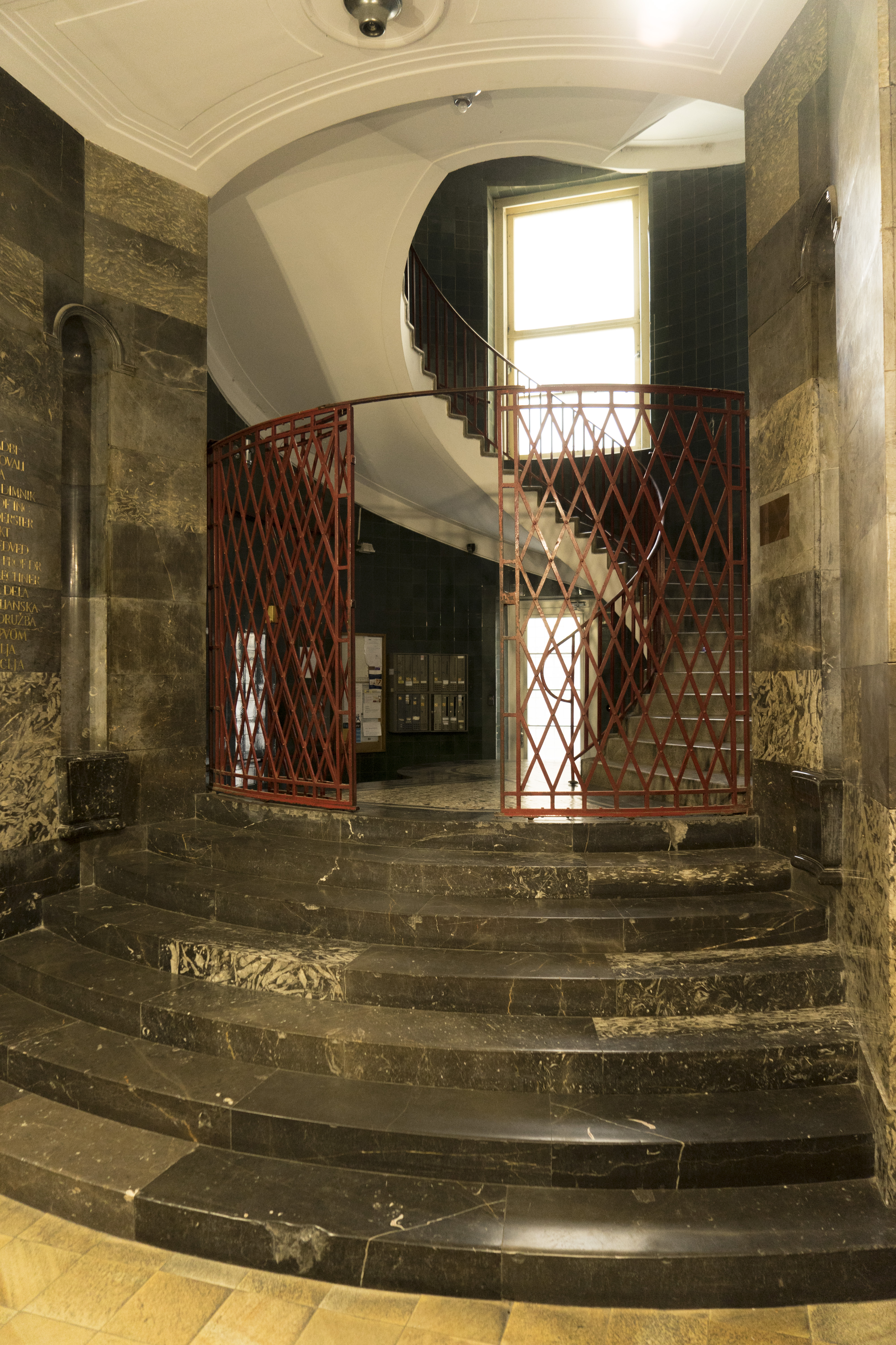 Nebotičnik, Ljubljana